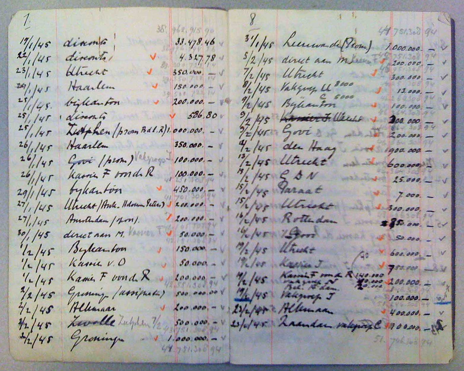 Notitieboekje met aantekeningen van betalingen ten behoeve van spoorwegstakers en verzetsgroepen, 1944/1945. Collectie NIOD.